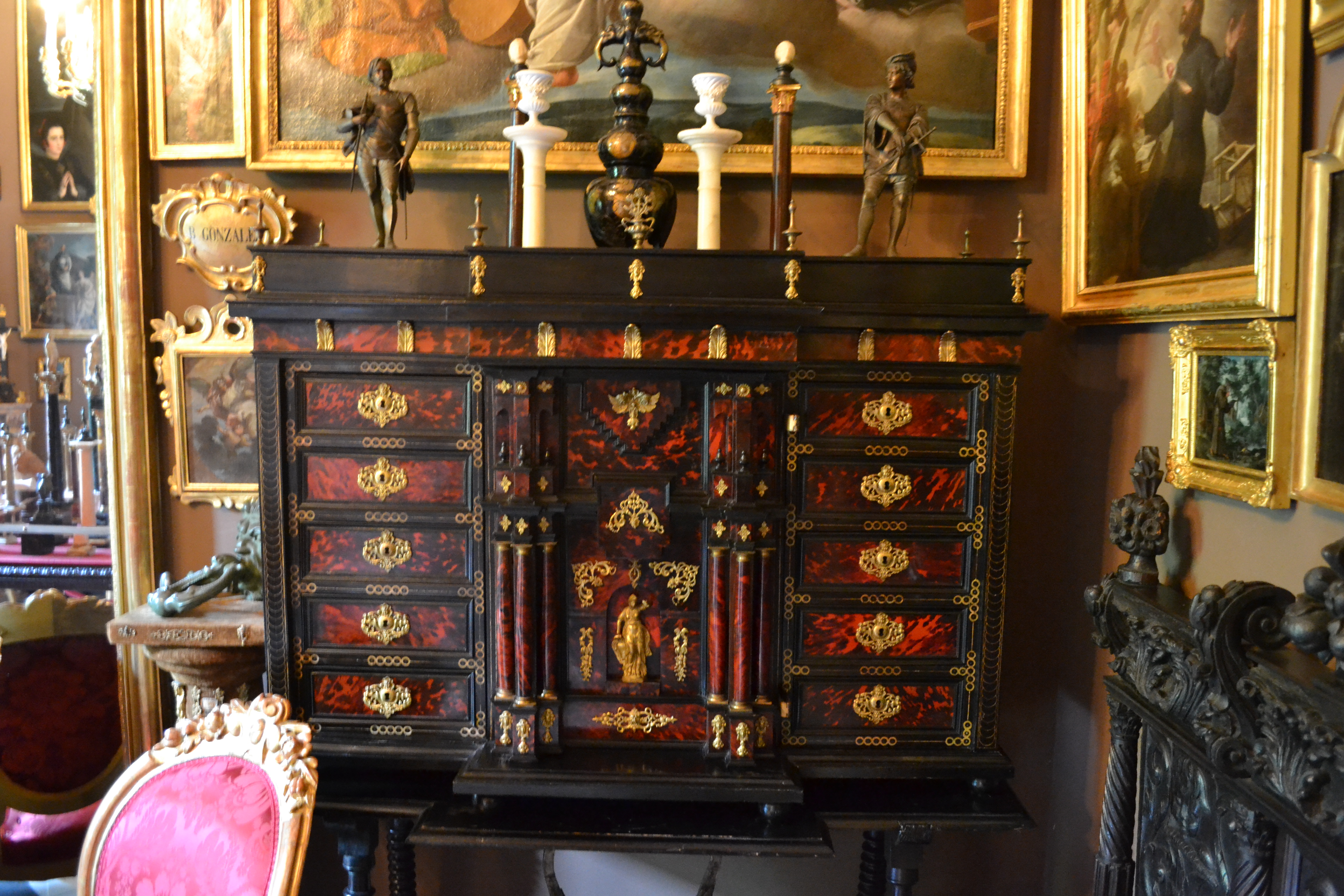 Bargueño. Museo Cerralbo, Madrid.